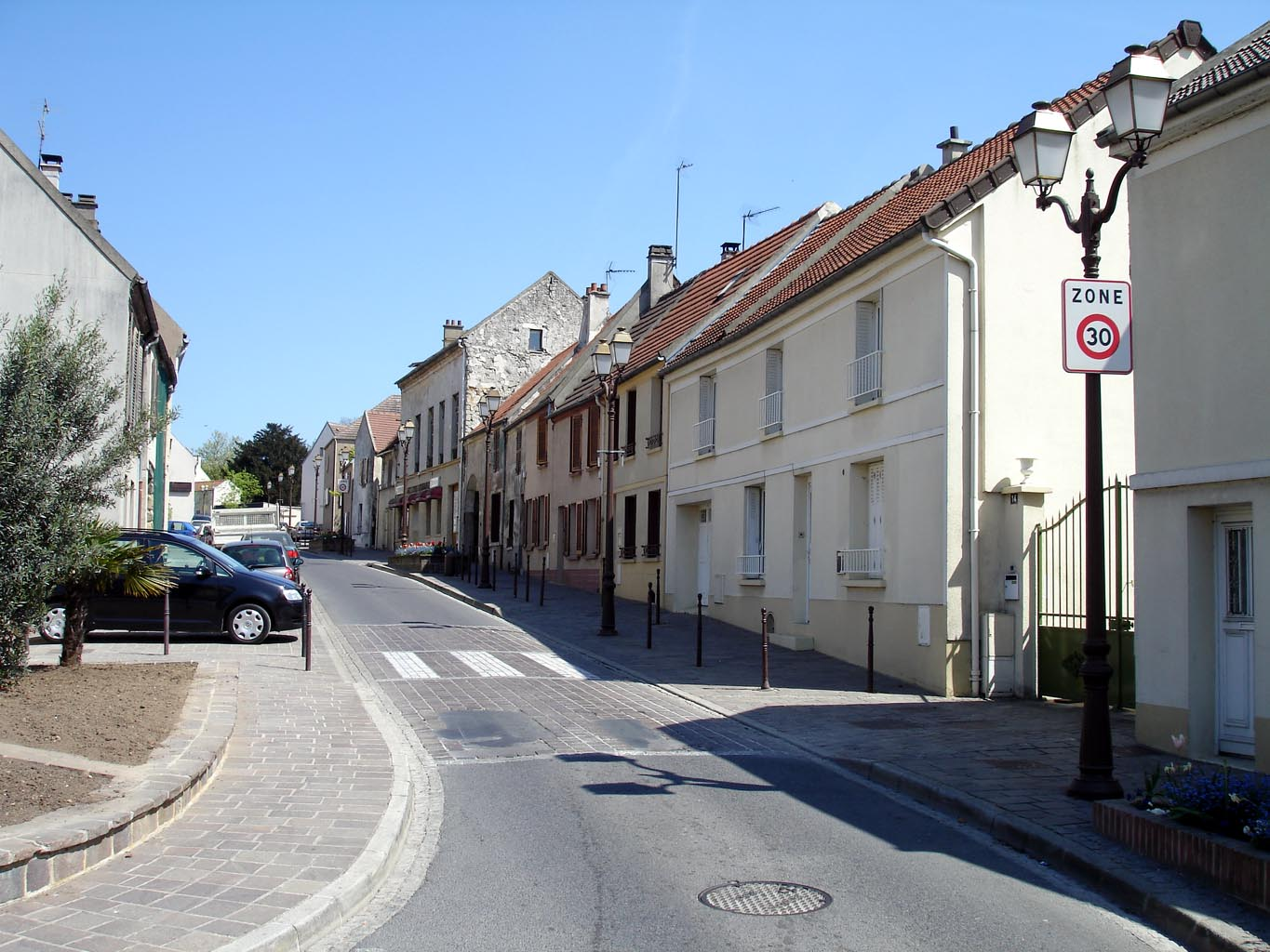 Avenue Charles-de-Gaulle (rue principale du village) à Roissy-en-France (Val-d'Oise), France